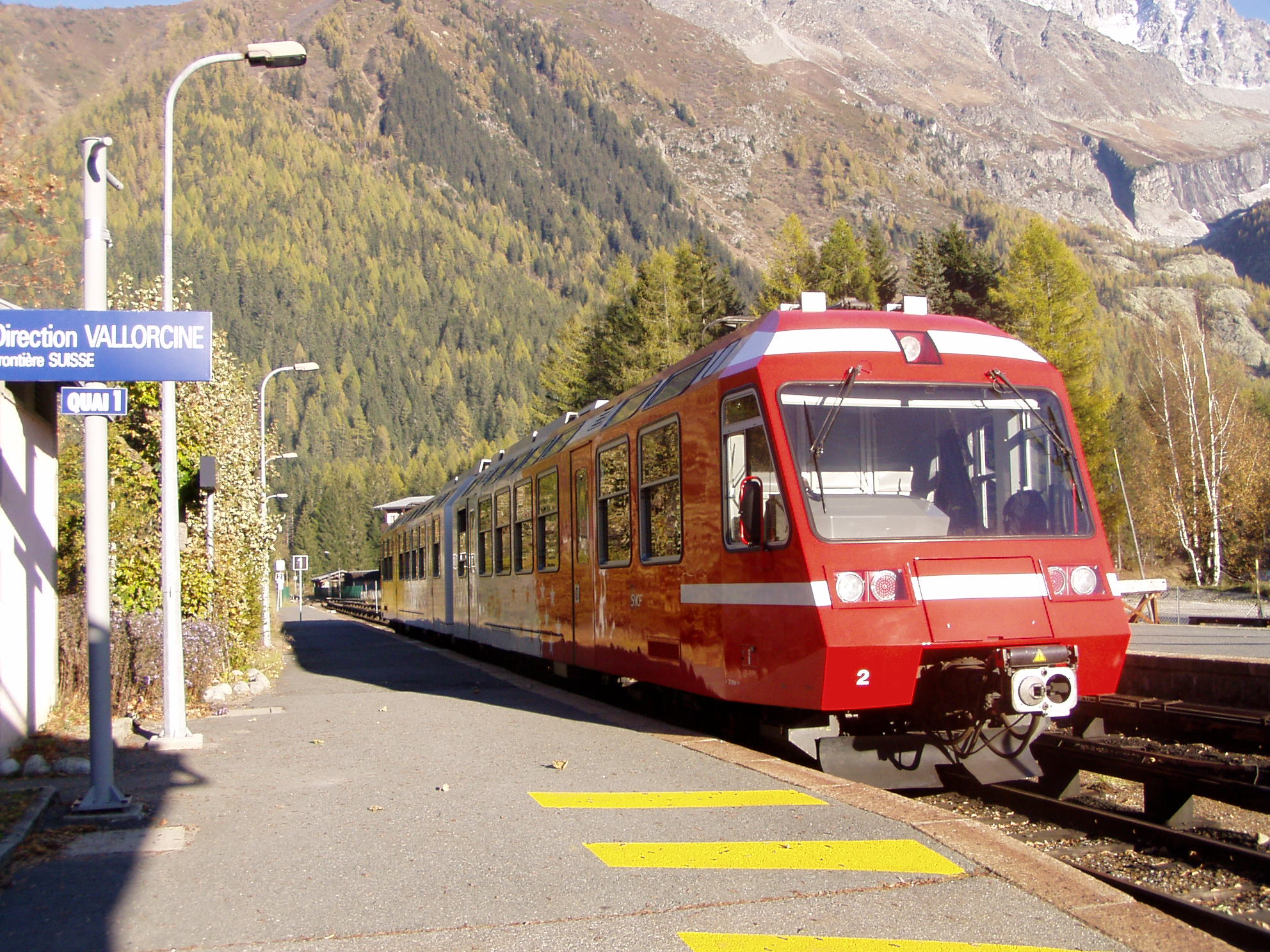 Zughalt in Argentière bei Chamonix